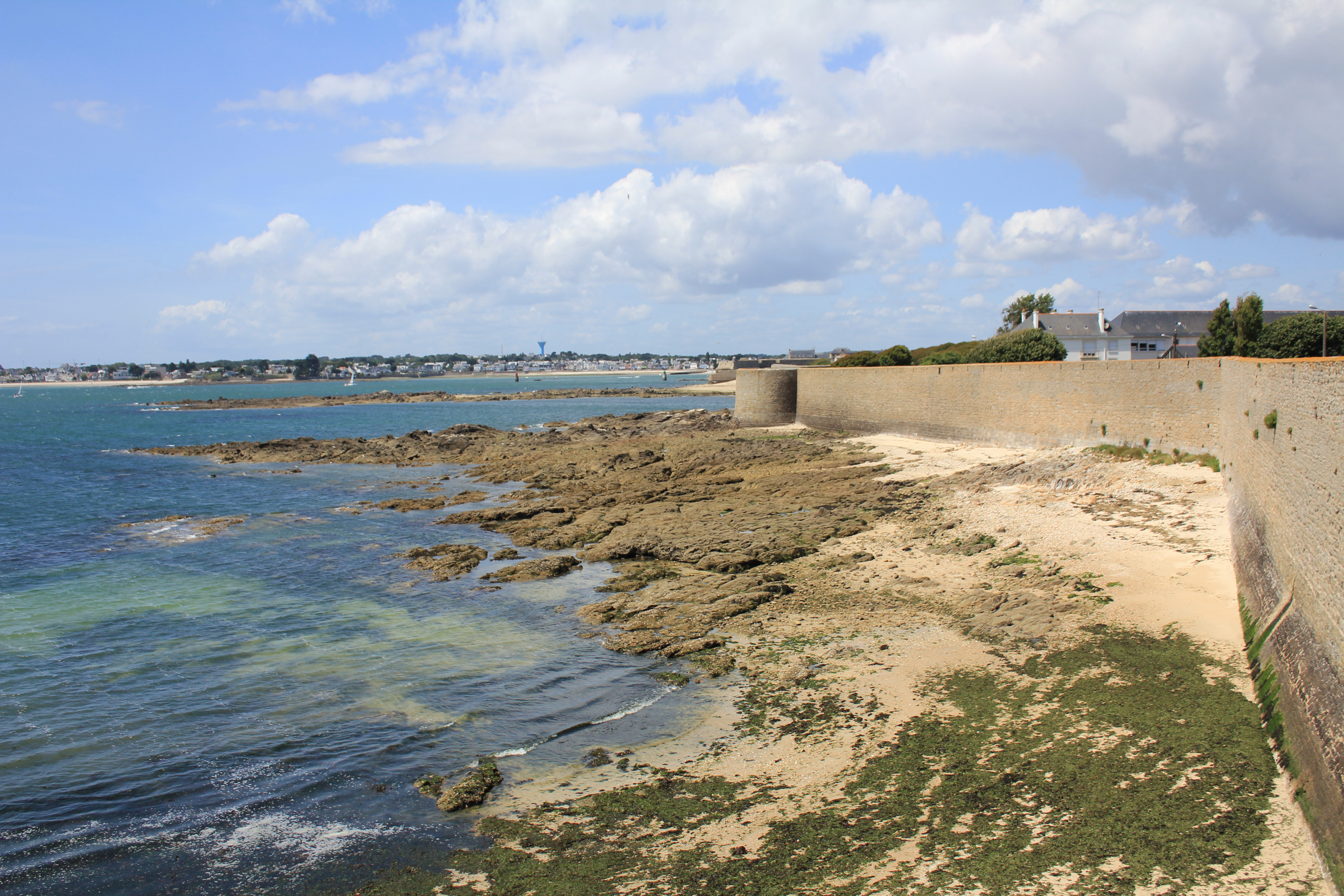 Rempart à Port-Louis, Morbihan, France